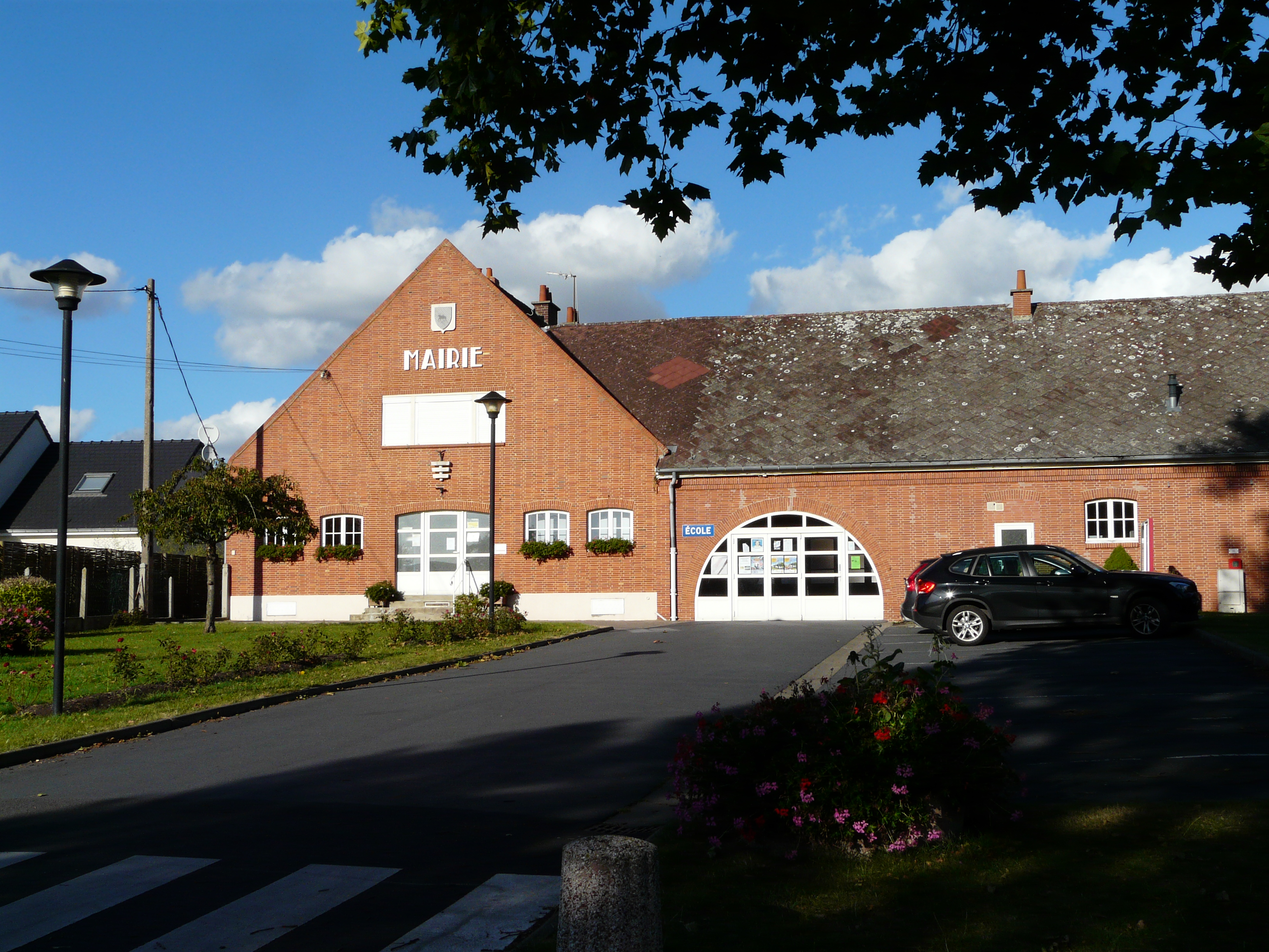 La Mairie